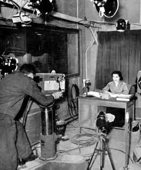 Télévision algéroise compte deux speakerines musulmanes : MME Kechroud et MME Farida. Nous voyons dans le studio encombré de câbles de projecteurs de caméras MME Kechroud présentant en "direct" et en langue arabe le programme du jour. Les speakerines françaises et musulmanes apparaissent à tour de rôle sur l'écran, les unes émettant en direct et les autres en voix "off" , le lendemain les rôles sont intervertis.